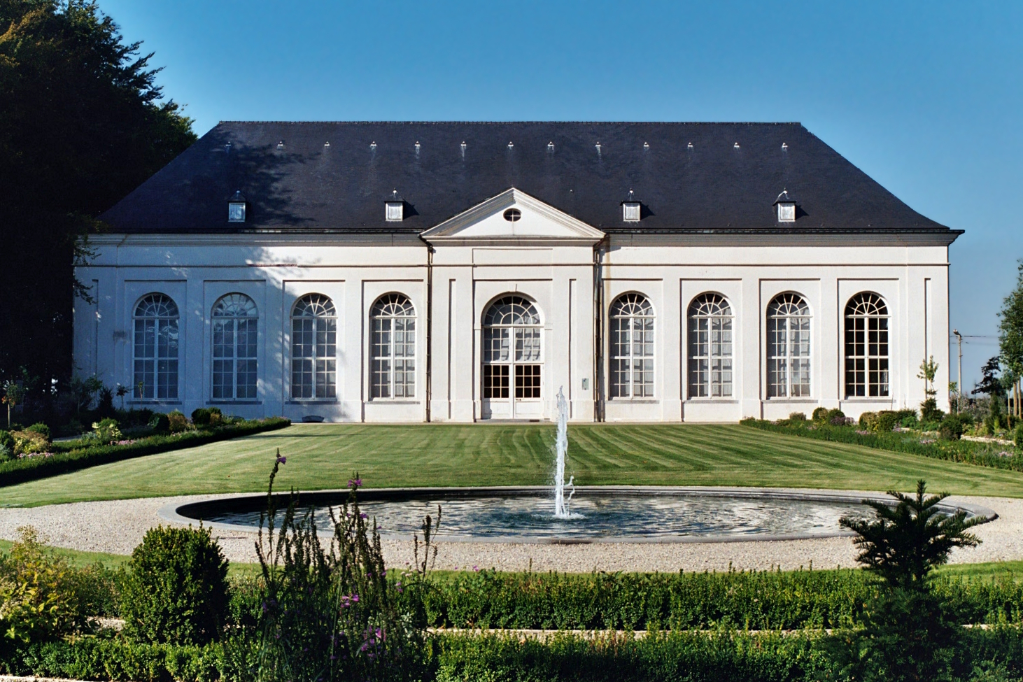 Belgique - Hainaut - Orangerie du château de Seneffe